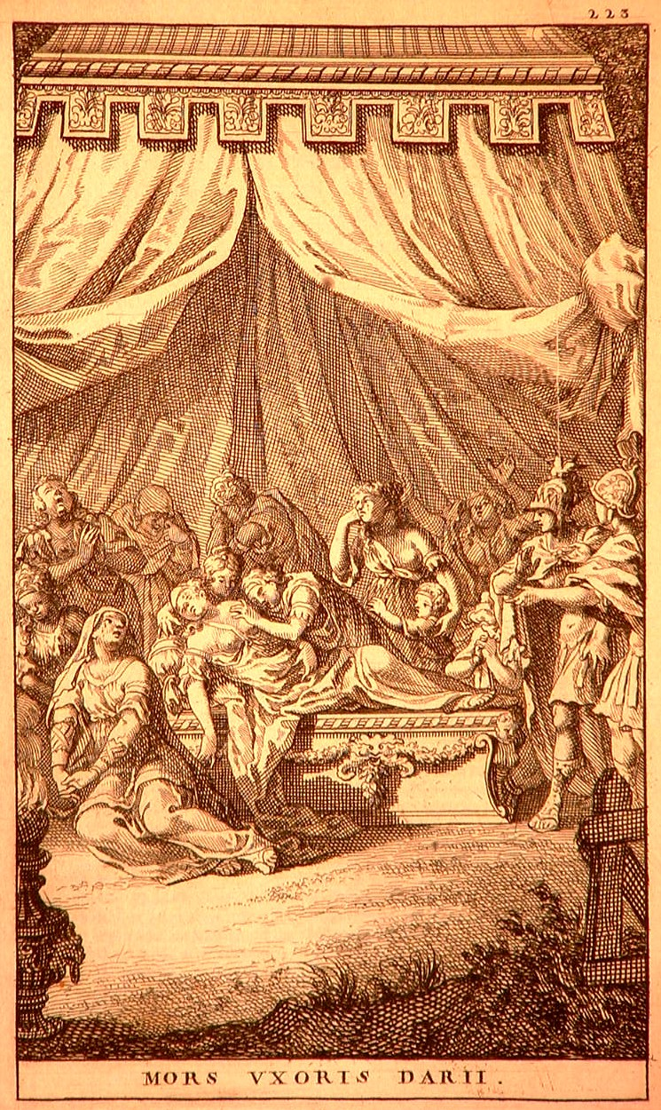 Alexander old drawings